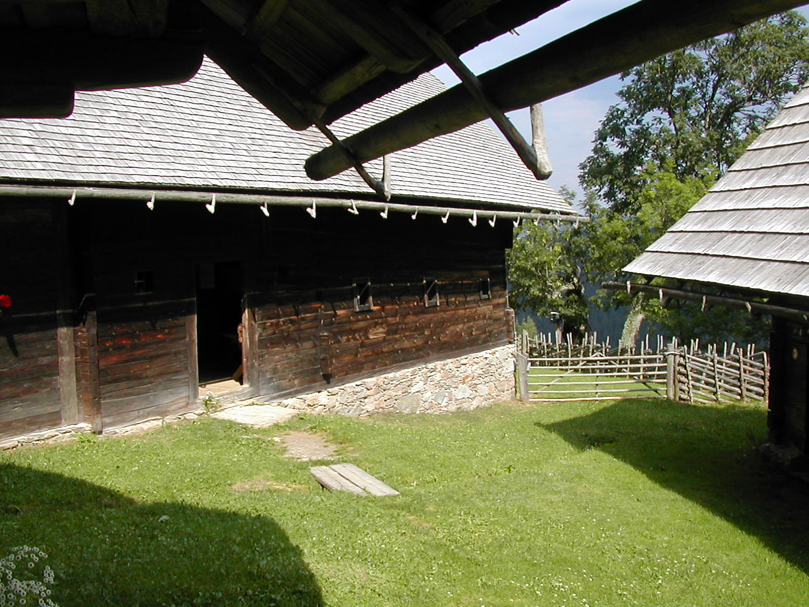 Roseggers Geburtshaus